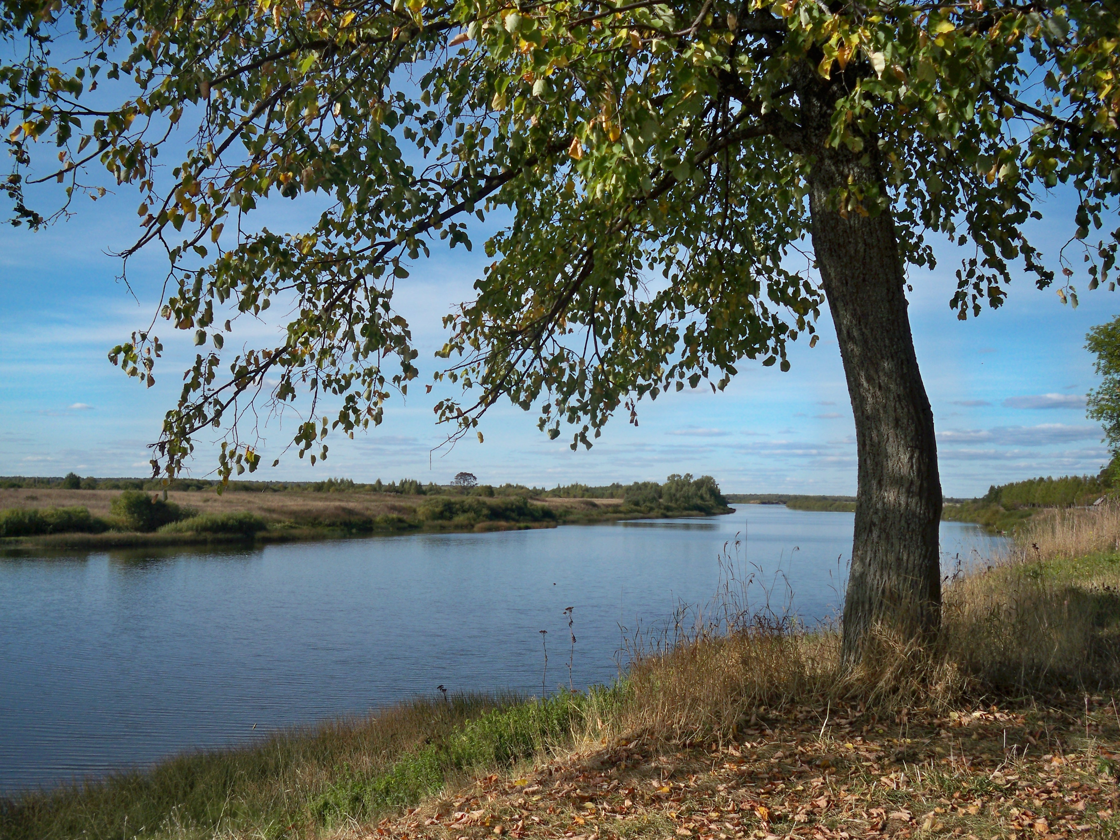 вид от села Большая Сандогора на закостромские дали